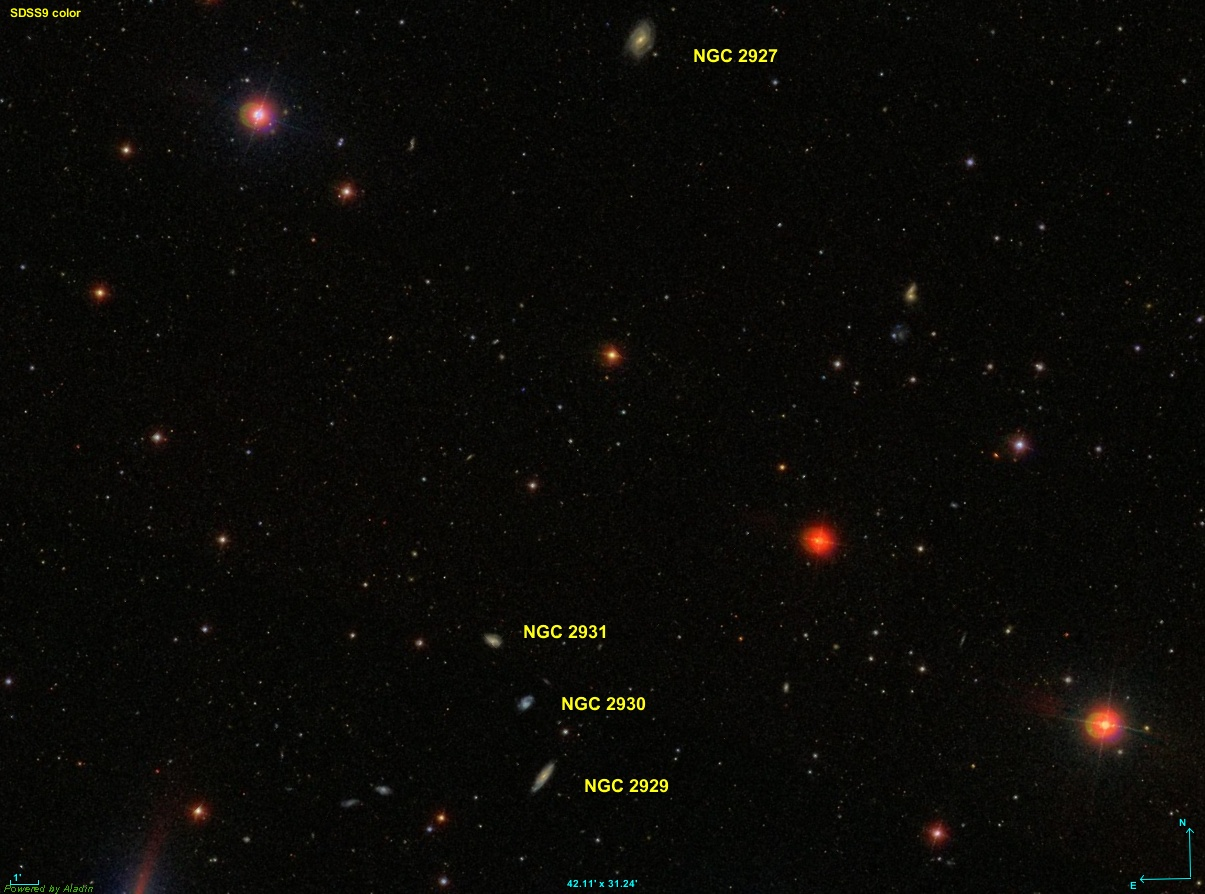 Image créée à l'aide du logiciel Aladin Sky Atlas du Centre de Données astronomiques de Strasbourg et des données publiques en format FIT de SDSS (Sloan Digital Sky Survey).